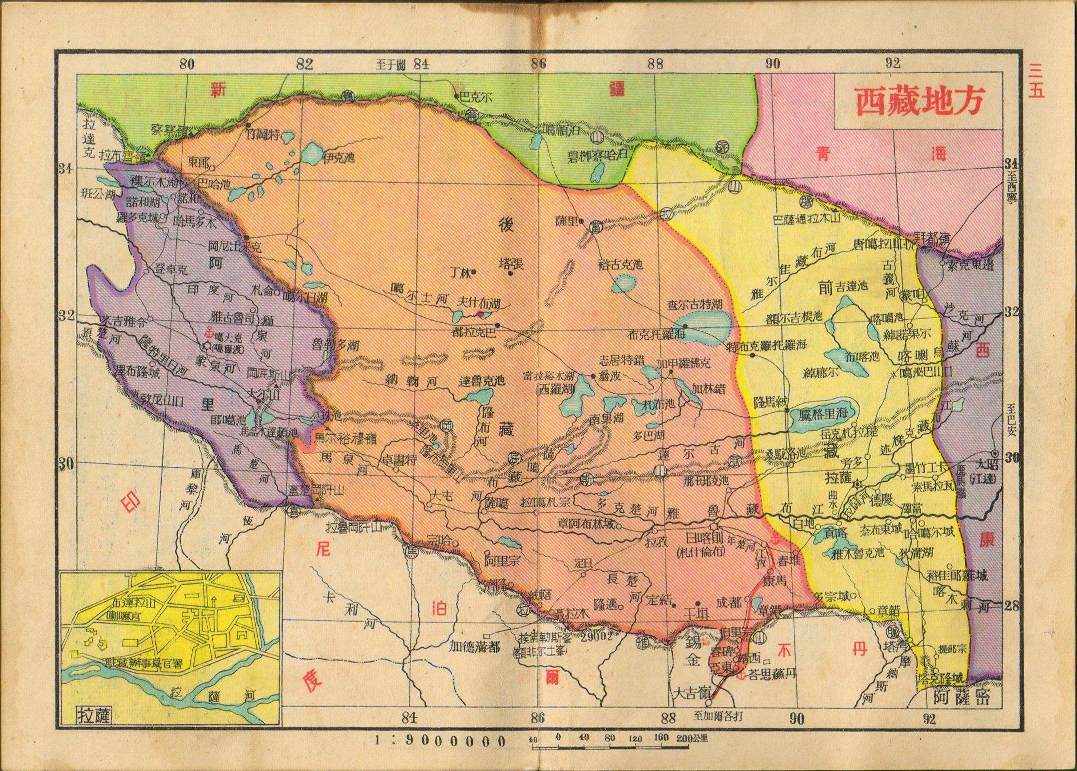 亚新地学社1936年《袖珍中华全图》西藏地方